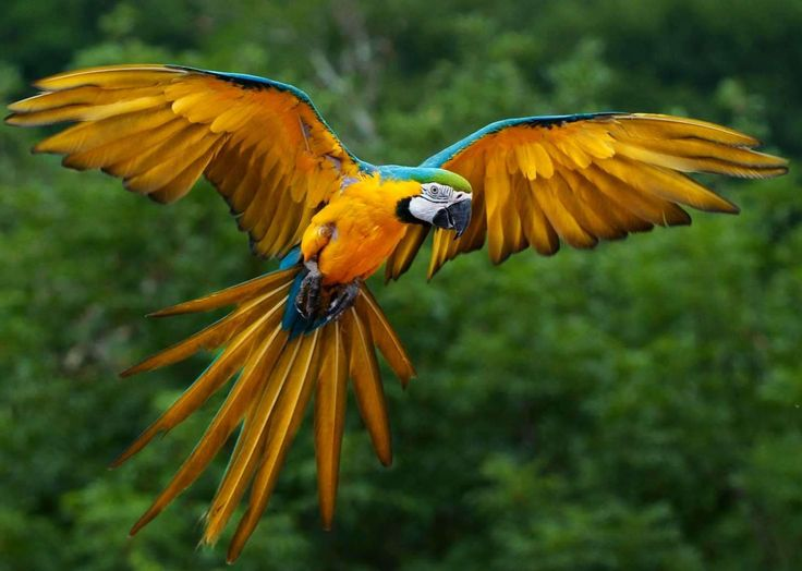 ম্যাকাও